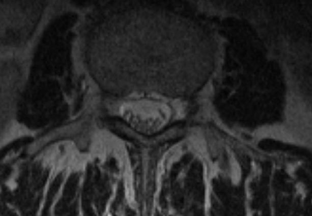 Bildbeschreibung: nerve roots - Nervenwurzeln Quelle: eigene Aufnahme Autor: User:Scuba-limp